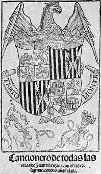 Portada del Cancionero de Juan del Encina